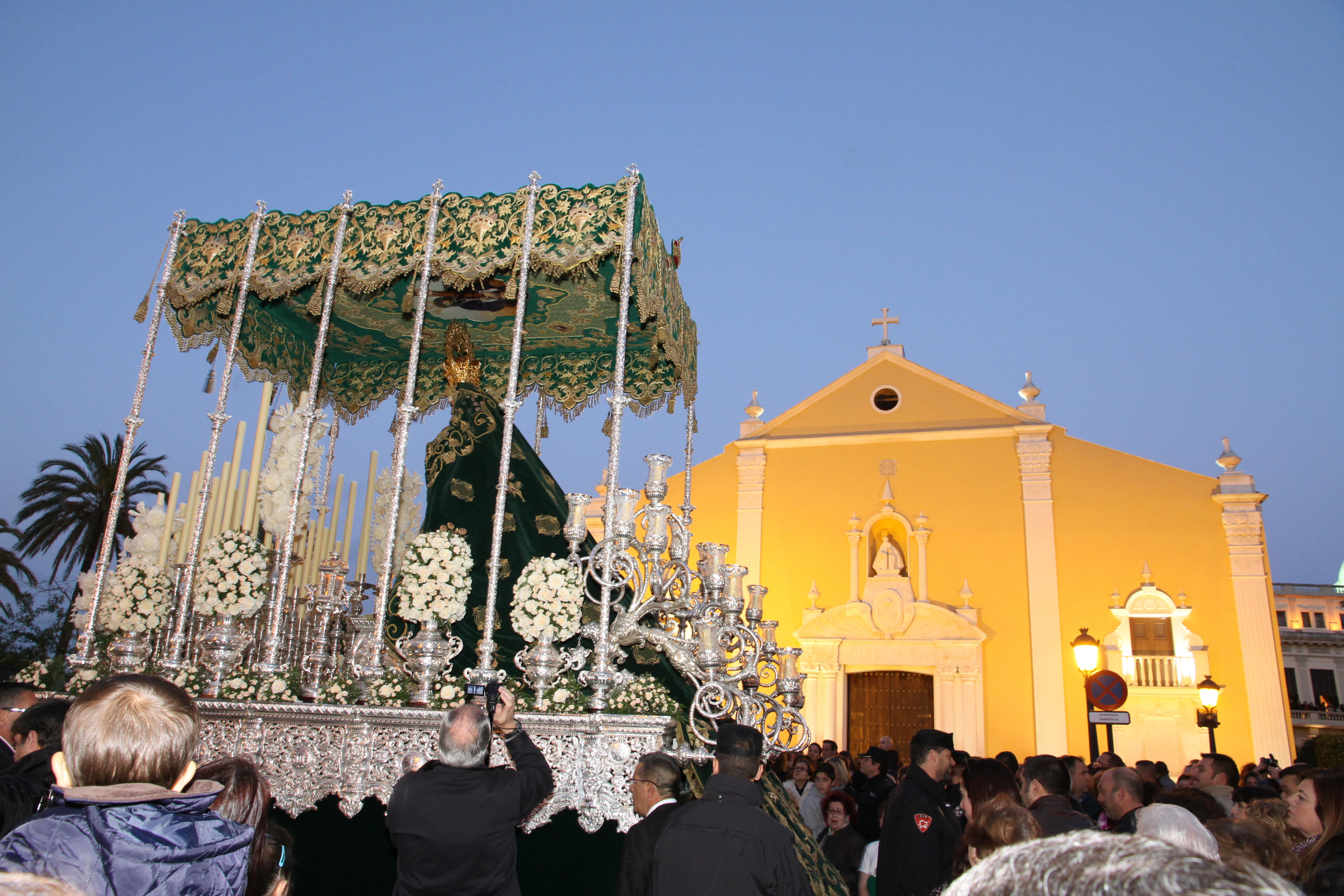 Paso de la Virgen de la Esperanza frente a la iglesia de la Virgen de África (noche del Sábado Santo de 2012, Semana Santa en Ceuta)